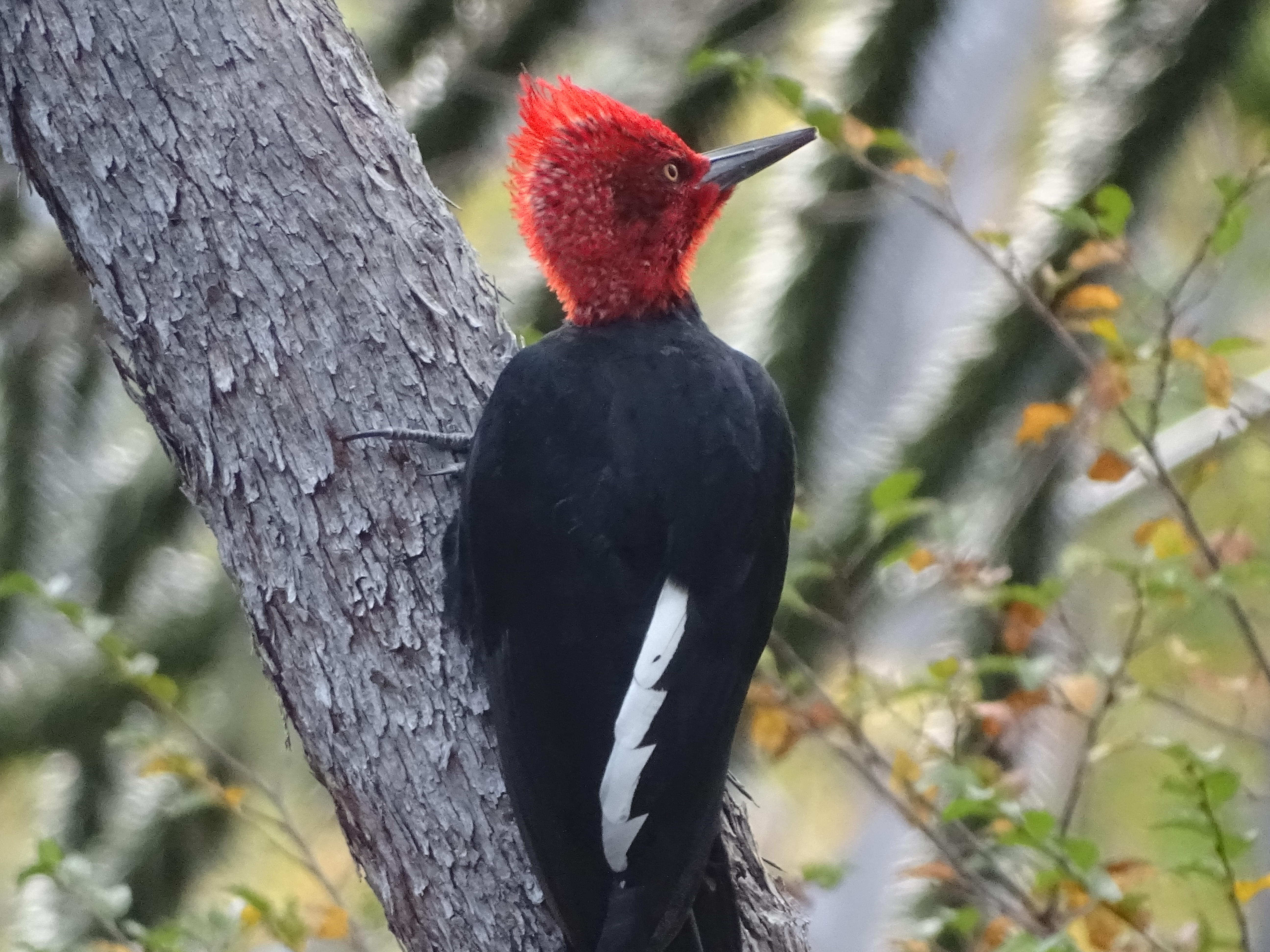 Carpintero negro macho; Habita los bosques andino-patagónicos de Chile y Argentina.